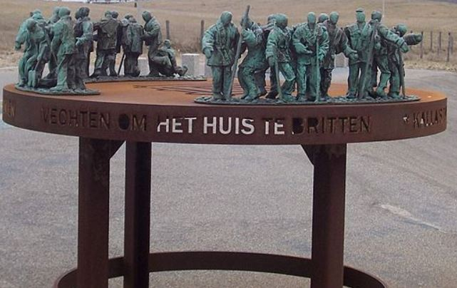 Monument Brittenburg, à Katwijk aan Zee par le scultpteur Nicolas Dings (2010).